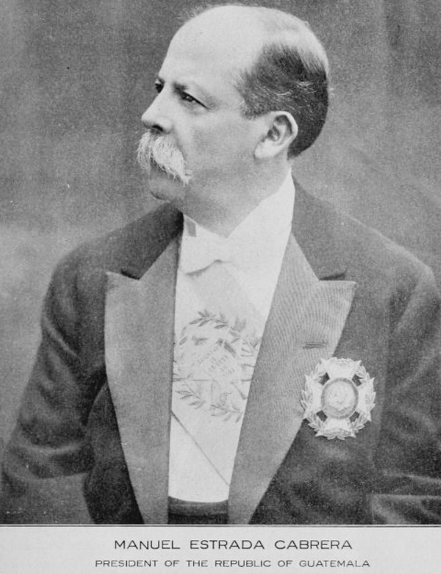 Presidente Manuel Estrada Cabrera en 1916